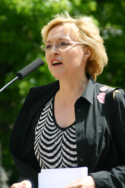 Dr. Beate Merk, CSU-Politikerin, Mitglied des Vorstandes und Präsidiums der CSU. Ausserdem ist sie seit 2005 stellvertretende CSU-Vorsitzende, seit Oktober 2003 bayerische Justizministerin.